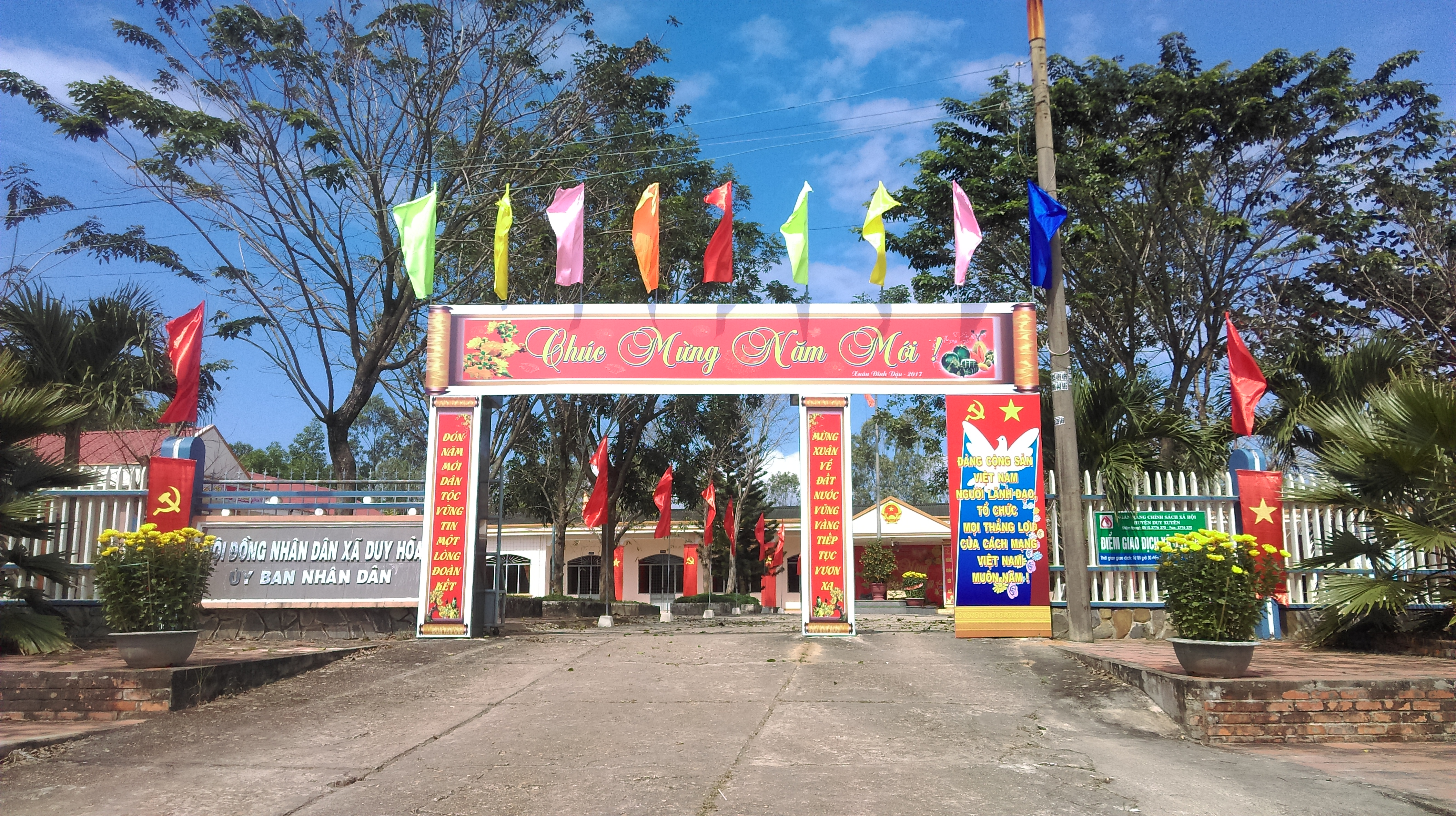 UBND xã Duy Hòa, Duy Xuyên, Quảng Nam